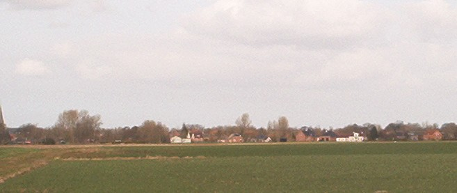 Ulrum.